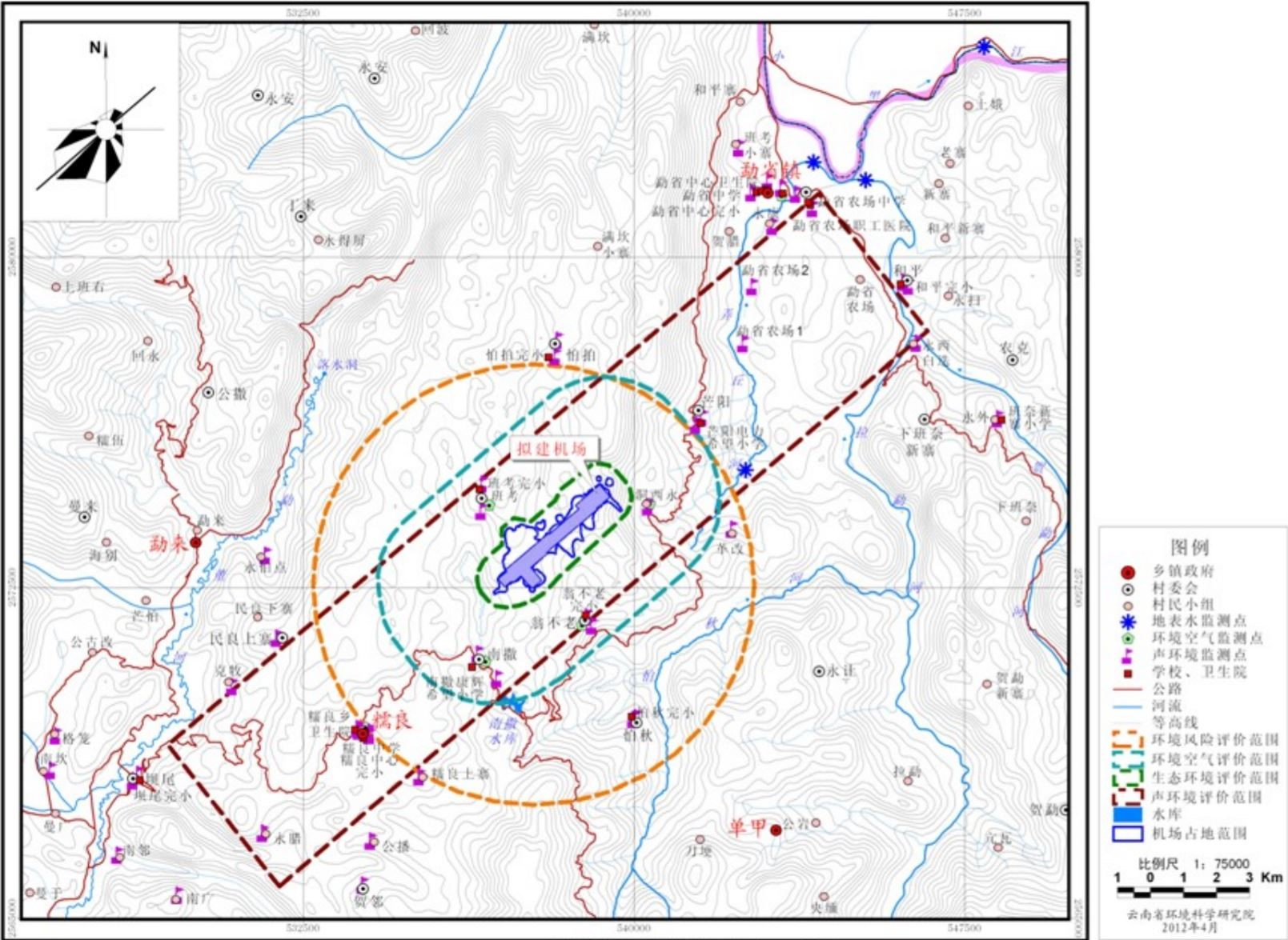 中文（中国大陆）: 《云南沧源瓦山民用机场项目 环境影响报告书简本》中沧源佤山机场拟建项目环评工作的示意图